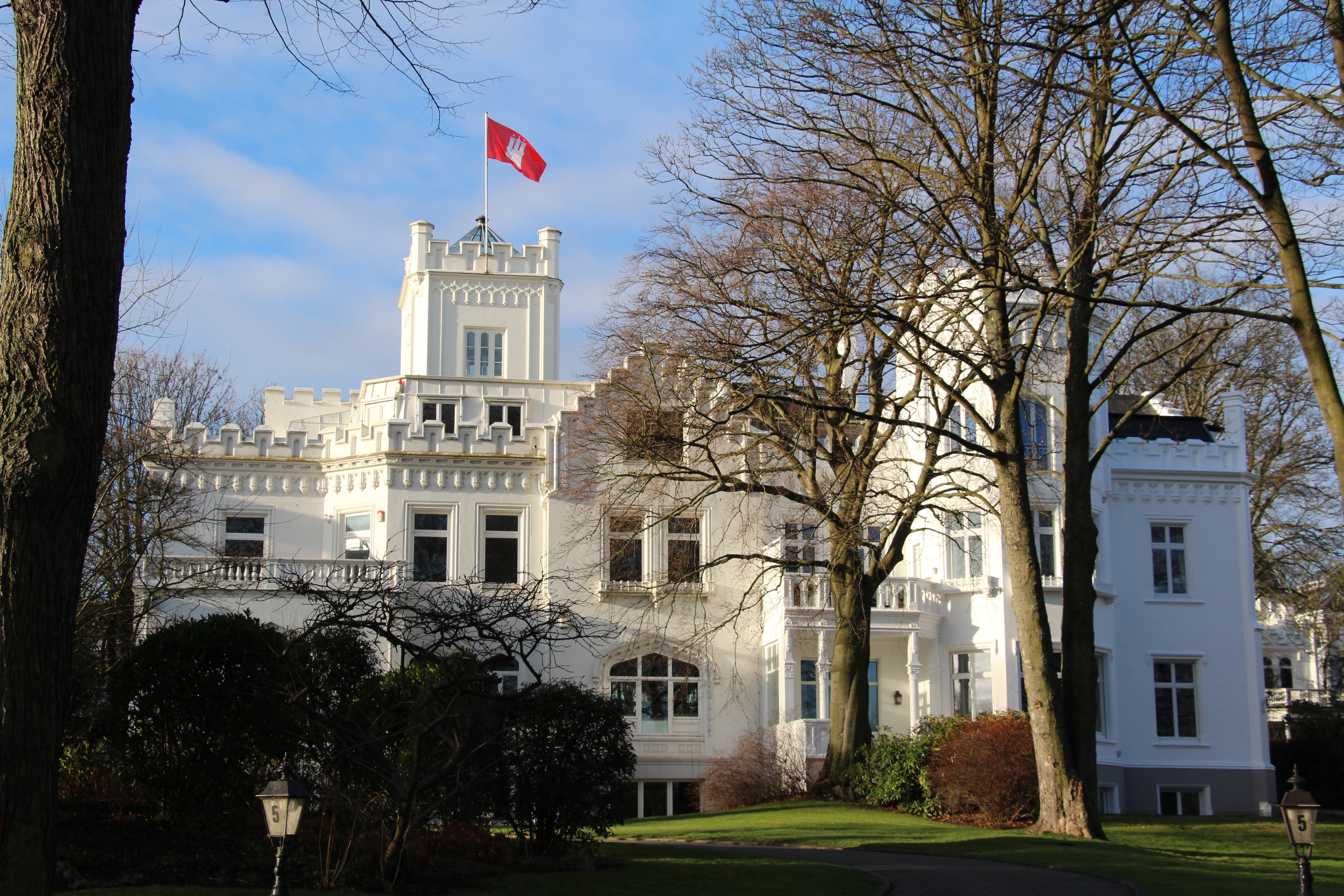 Neogotische Doppelvilla am Harvestehuder Weg 5 und 6 in Hamburg